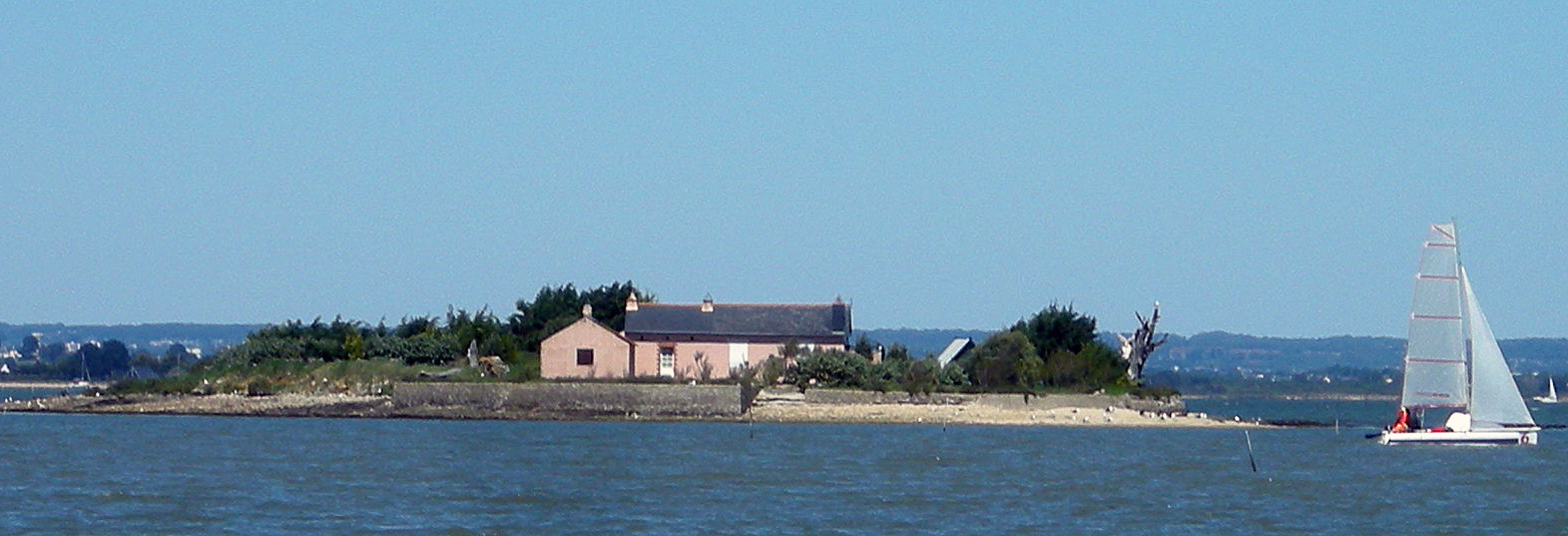 l'île des œufs vue de la pointe du Ruault